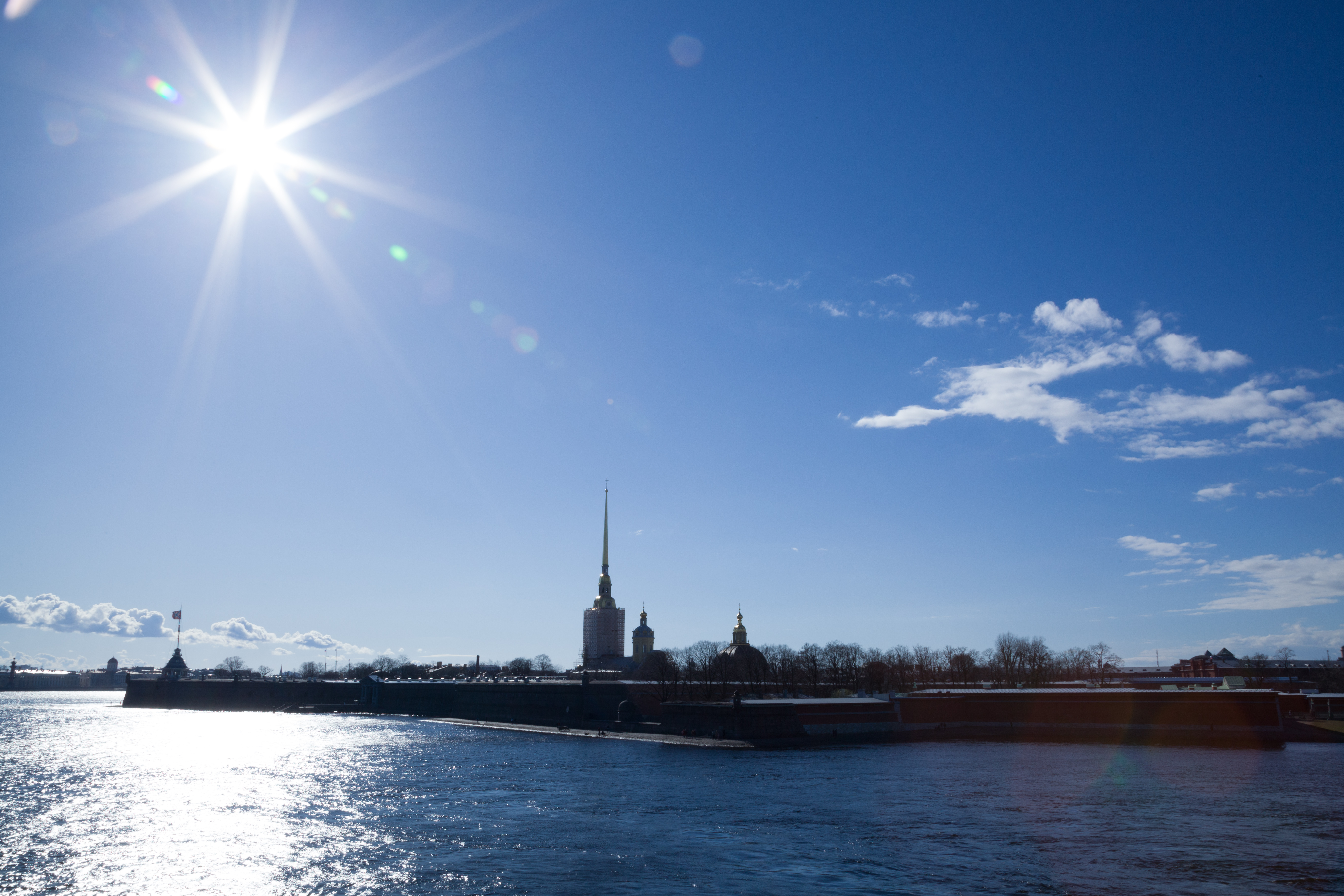 Вид на Заячий остров